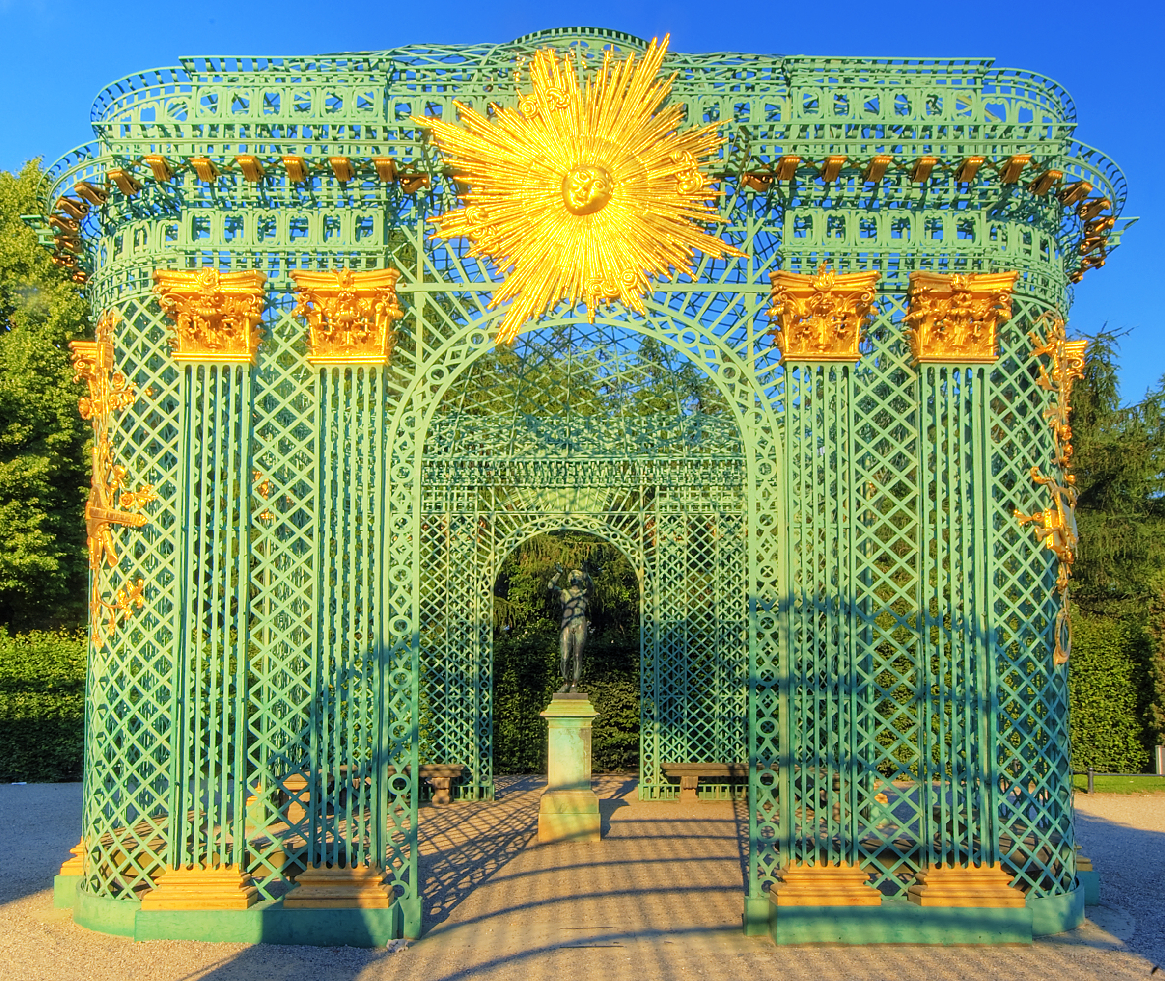 Potsdam, Sanssouci, Gitterpavillon